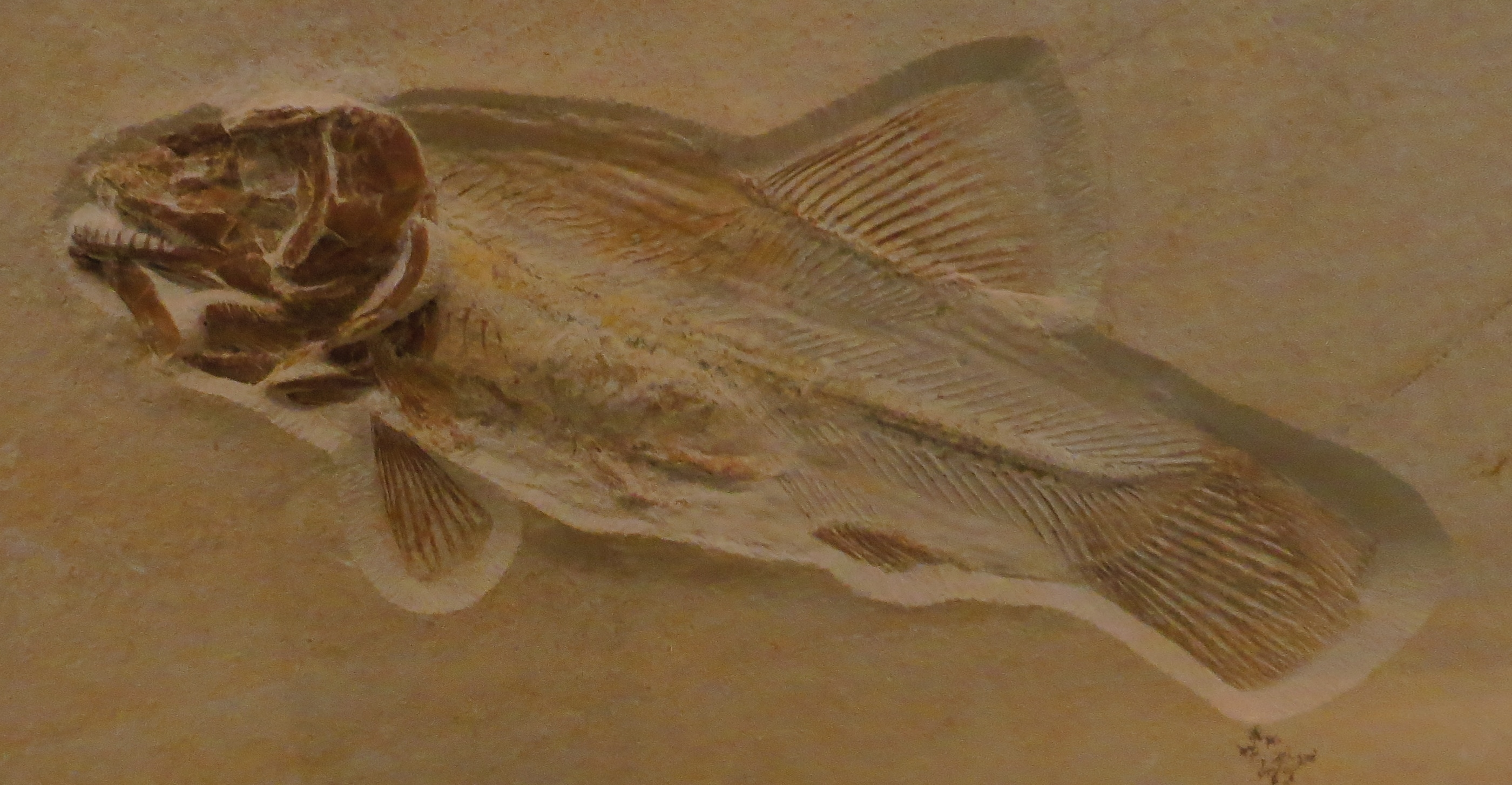 Took the picture at Burgmeister Muller Museum, Solnhofen